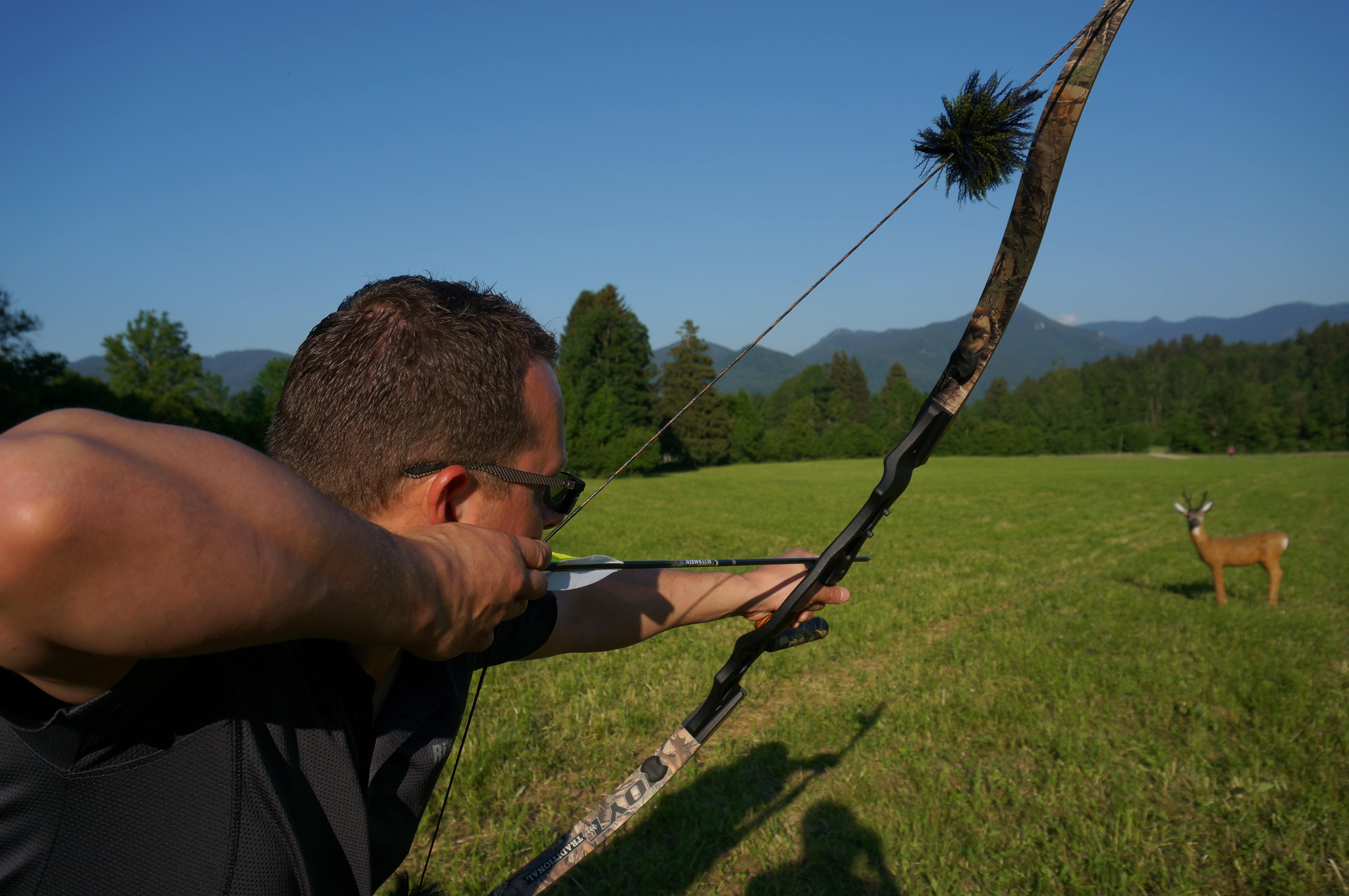 3D Parcour Isarwinkler Bogenschützen